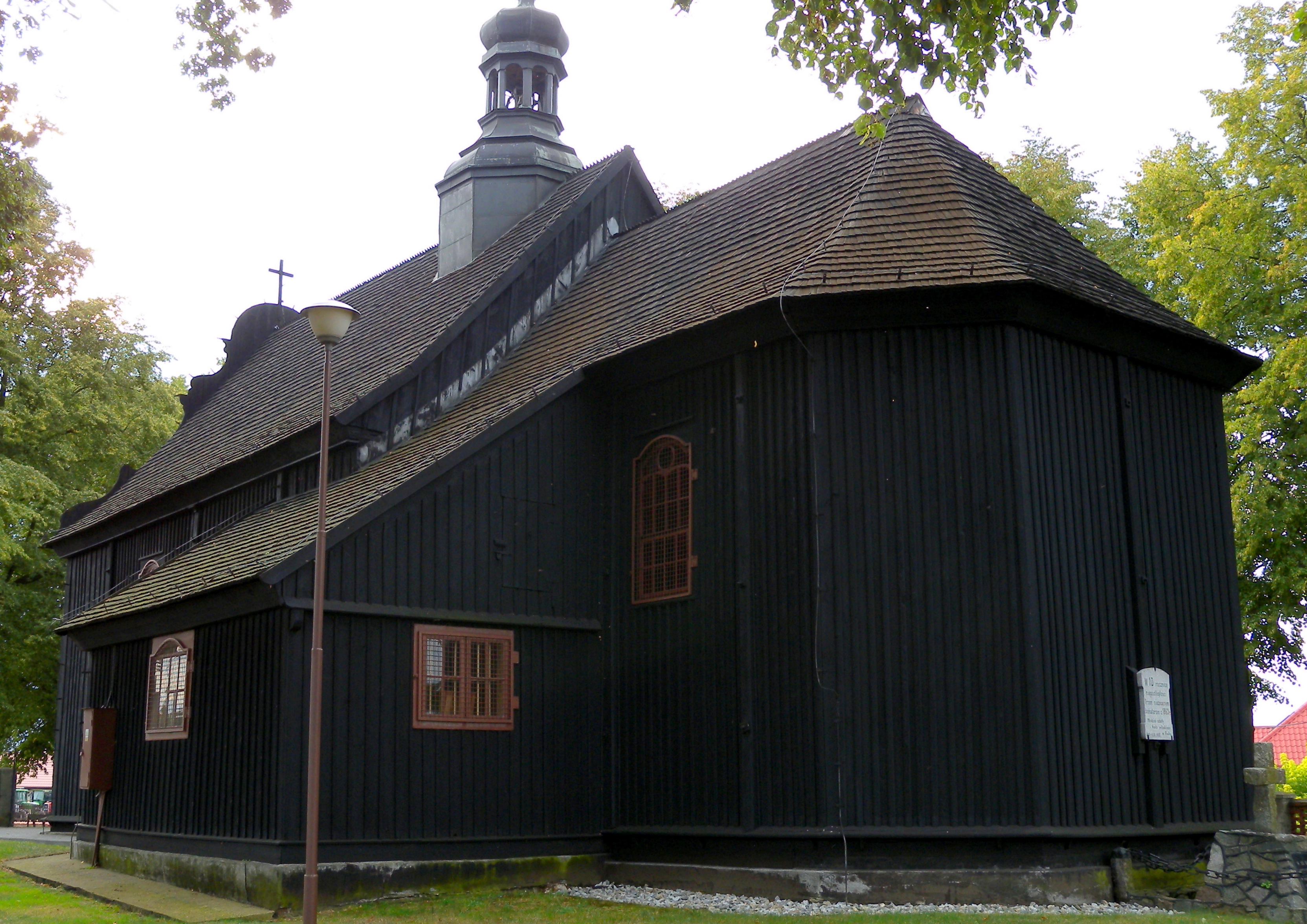 kościół parafialny pw. świętych Piotra i Pawła, drewniany, XVIII-XIX w., nr rej.: 3-I-3 z 10.09.1947 oraz A/3 z 25.08.1967